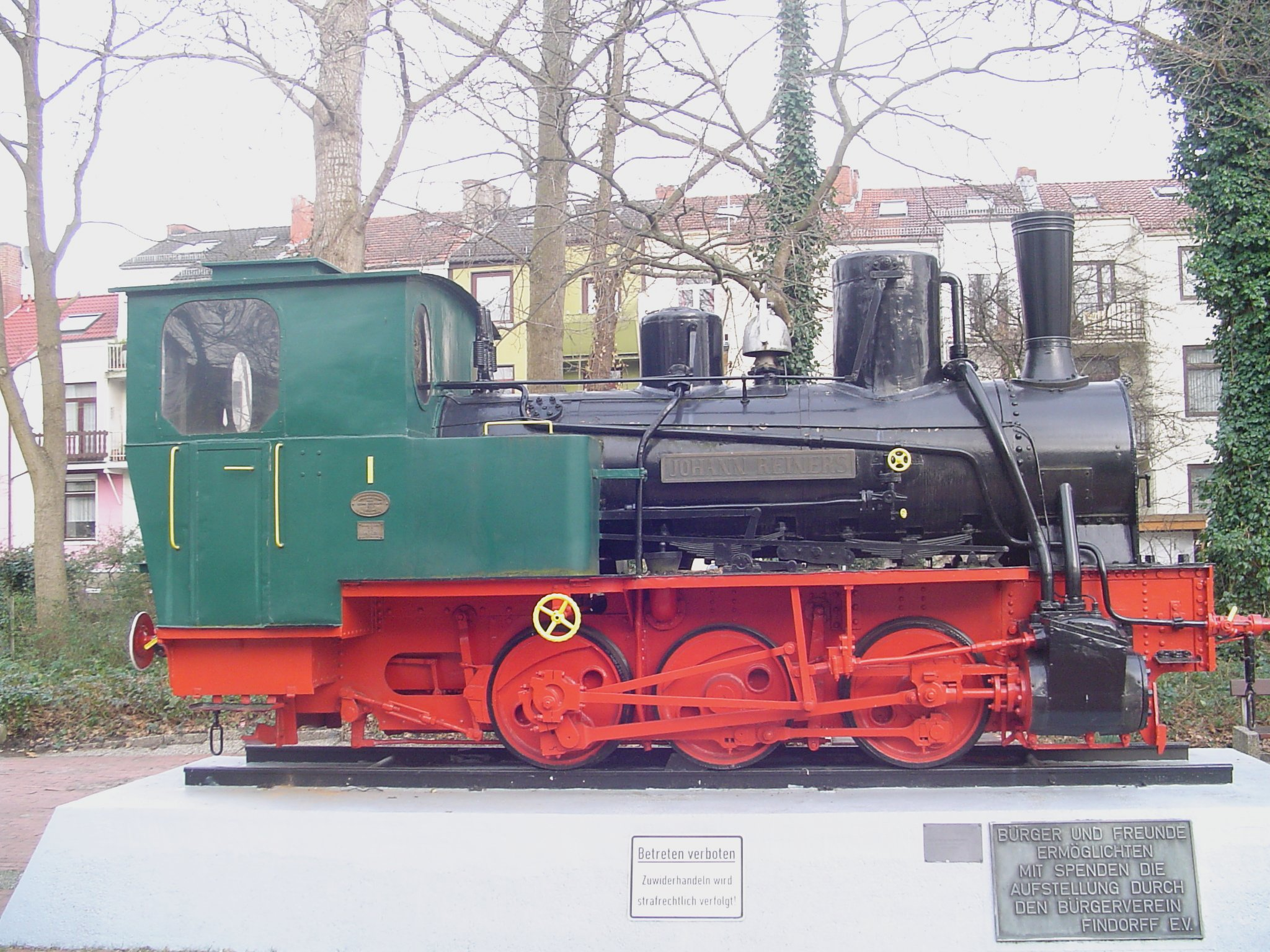 Denkmallok der ehemaligen Kleinbahn Bremen-Tarmstedt, genannt Jan Reiners , Ansicht von rechts. Standort: Bremen-Findorff